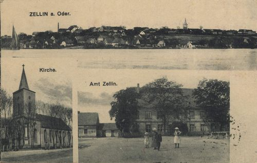 Postkarte von Zellin in der Neumark mit Kirche, Amt & Oderansicht